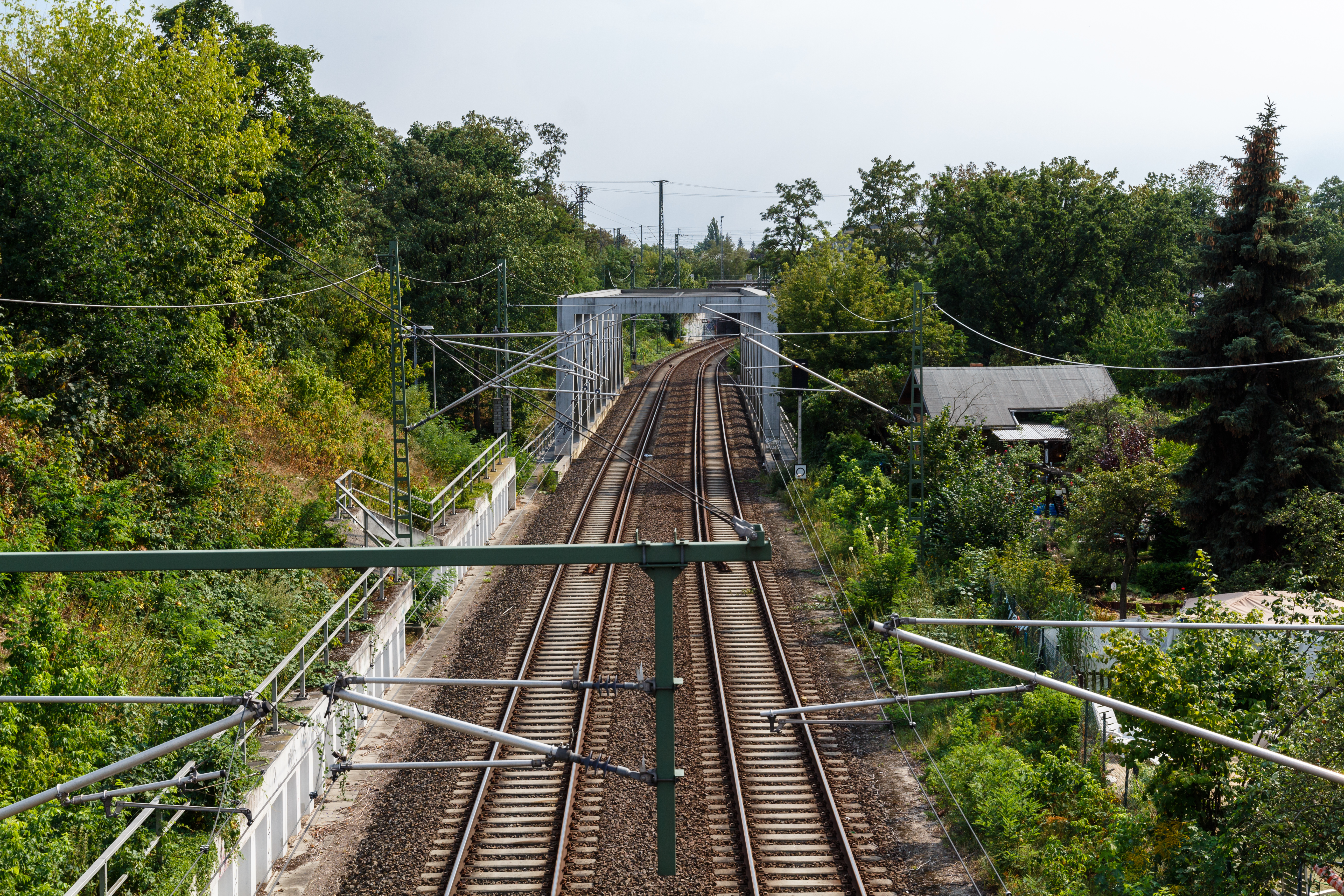 Verbindungskurve der Berlin Ringbahn zur Wetzlarer Bahn in Berlin-Charlottenburg und Halensee. Blick nach Süden von der Brücke Am Westkreuz. Die Brücke im Hintergrund führt über die von der Stadtbahn kommende S-Bahnstrecke.